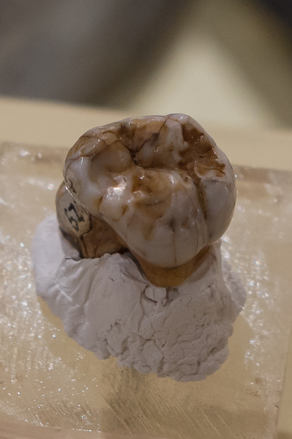 Im Jahr 2000 in der Denisova-Höhle gefundener Molar Denisova 4. Original, ausgestellt in der Sonderausstellung "Le troisième Homme" im Musée national de Préhistoire in Les Eyzies-de-Tayac, Frankreich.